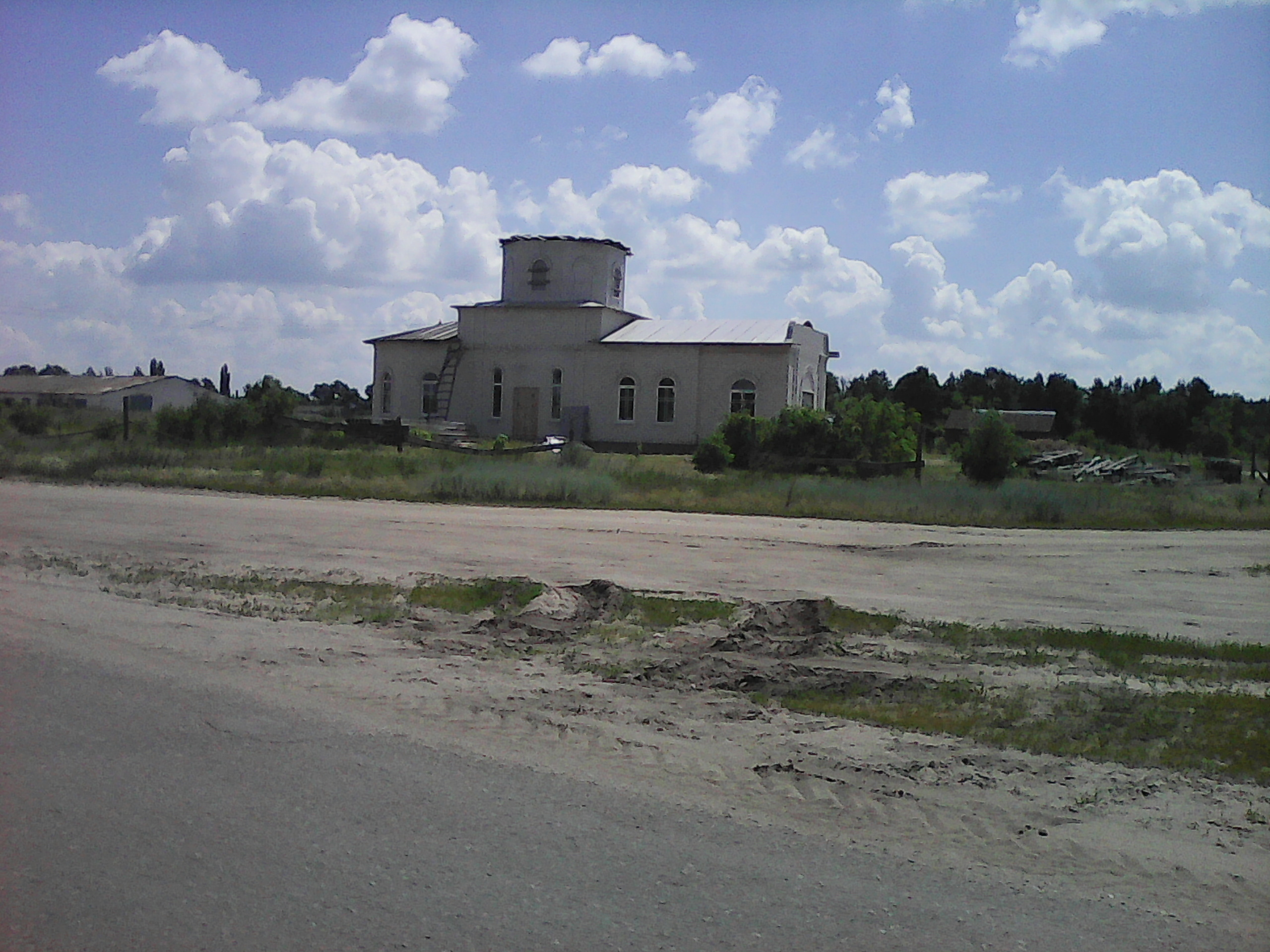 Церковь в селе Александровка Донская